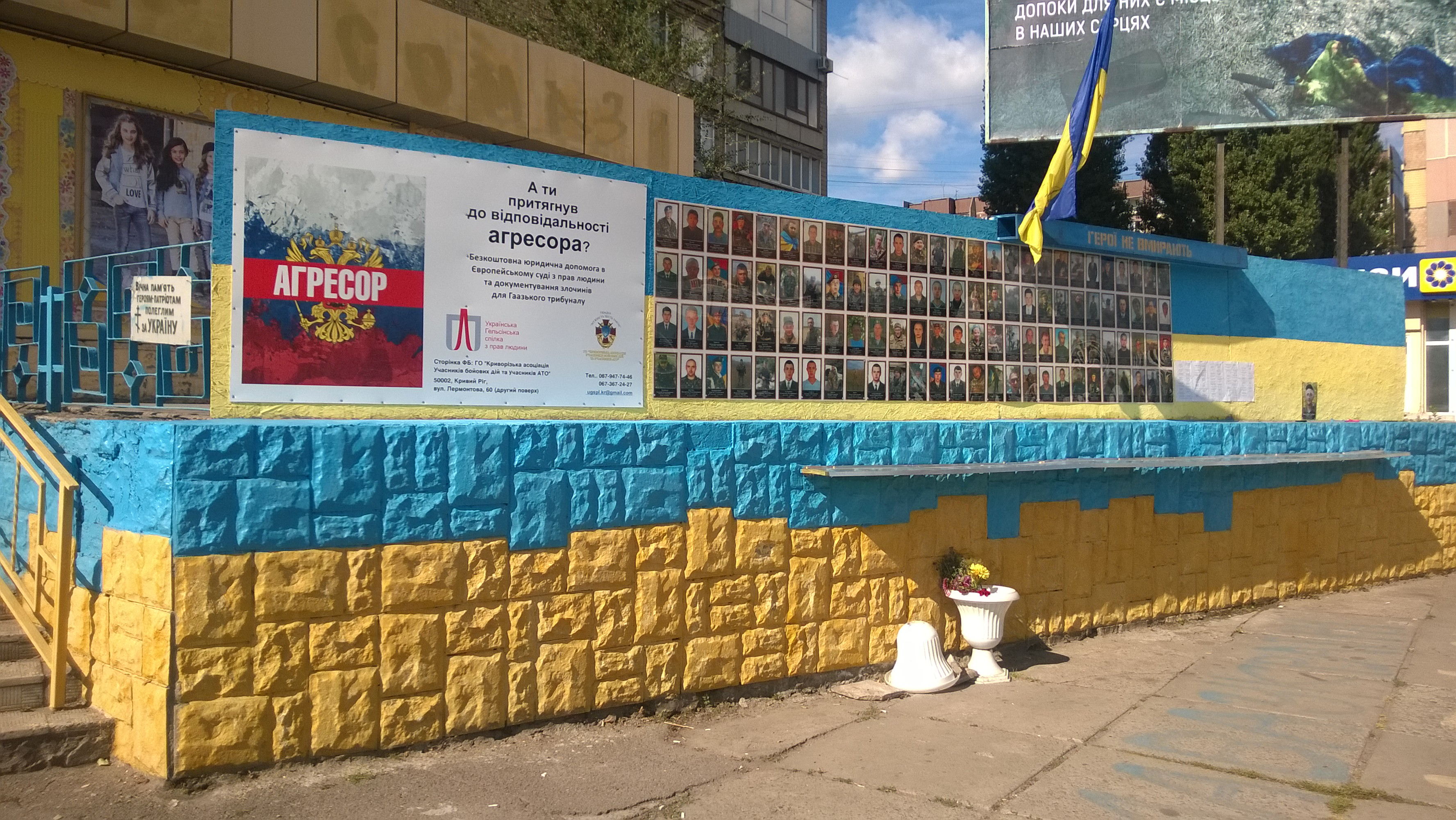 Імпровізований меморіал у Кривому Розі воїнам 25-ї повітряно-десантної бригади, загиблим внаслідок збиття літака Іл-76 проросійськими терористами